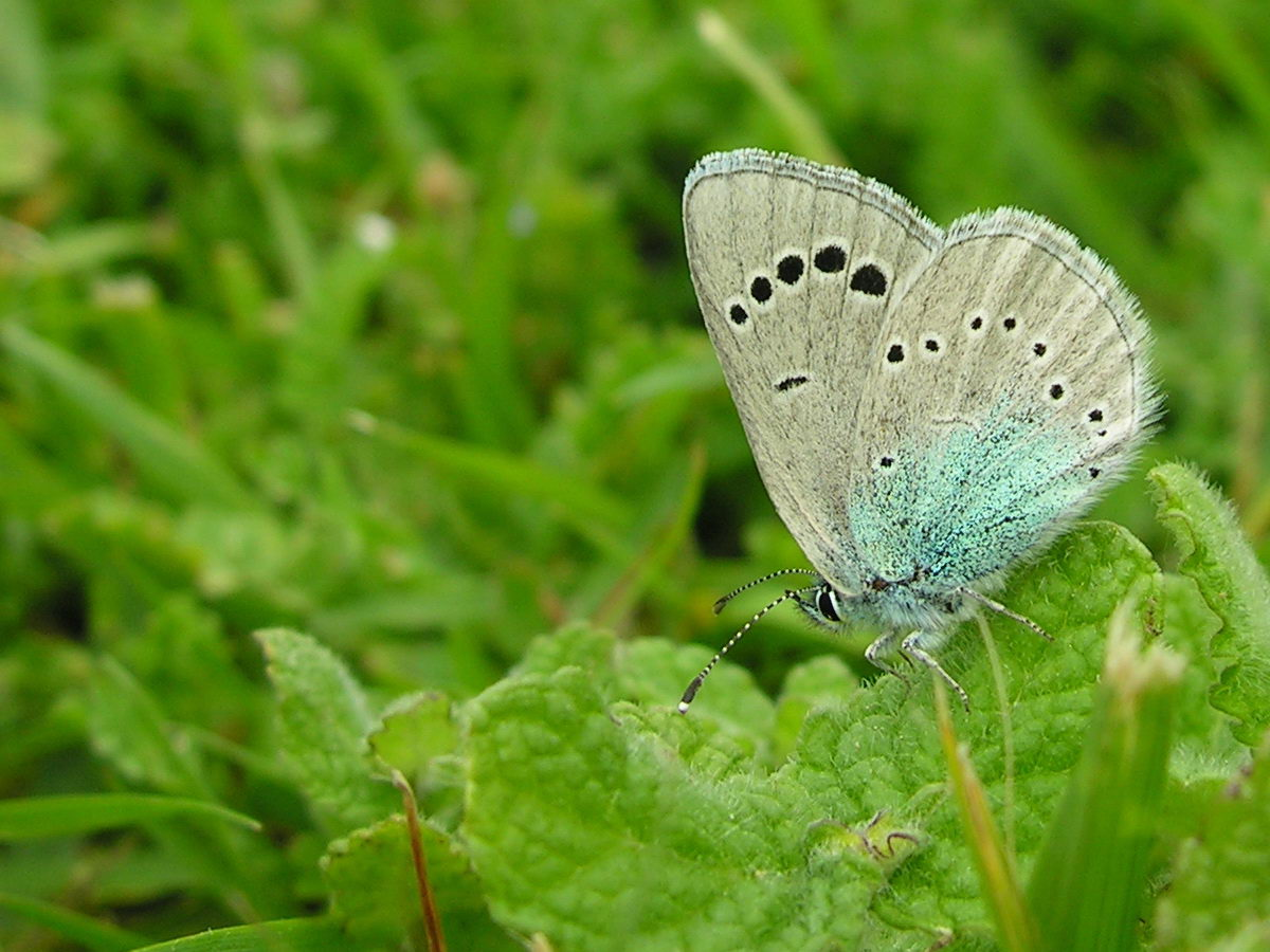 Foto dunha bolboreta. 7 de Maio de 2006 en Mandaio, Oza dos Ríos, Galicia, Publish by= Luis Miguel Bugallo Sánchez. Self made